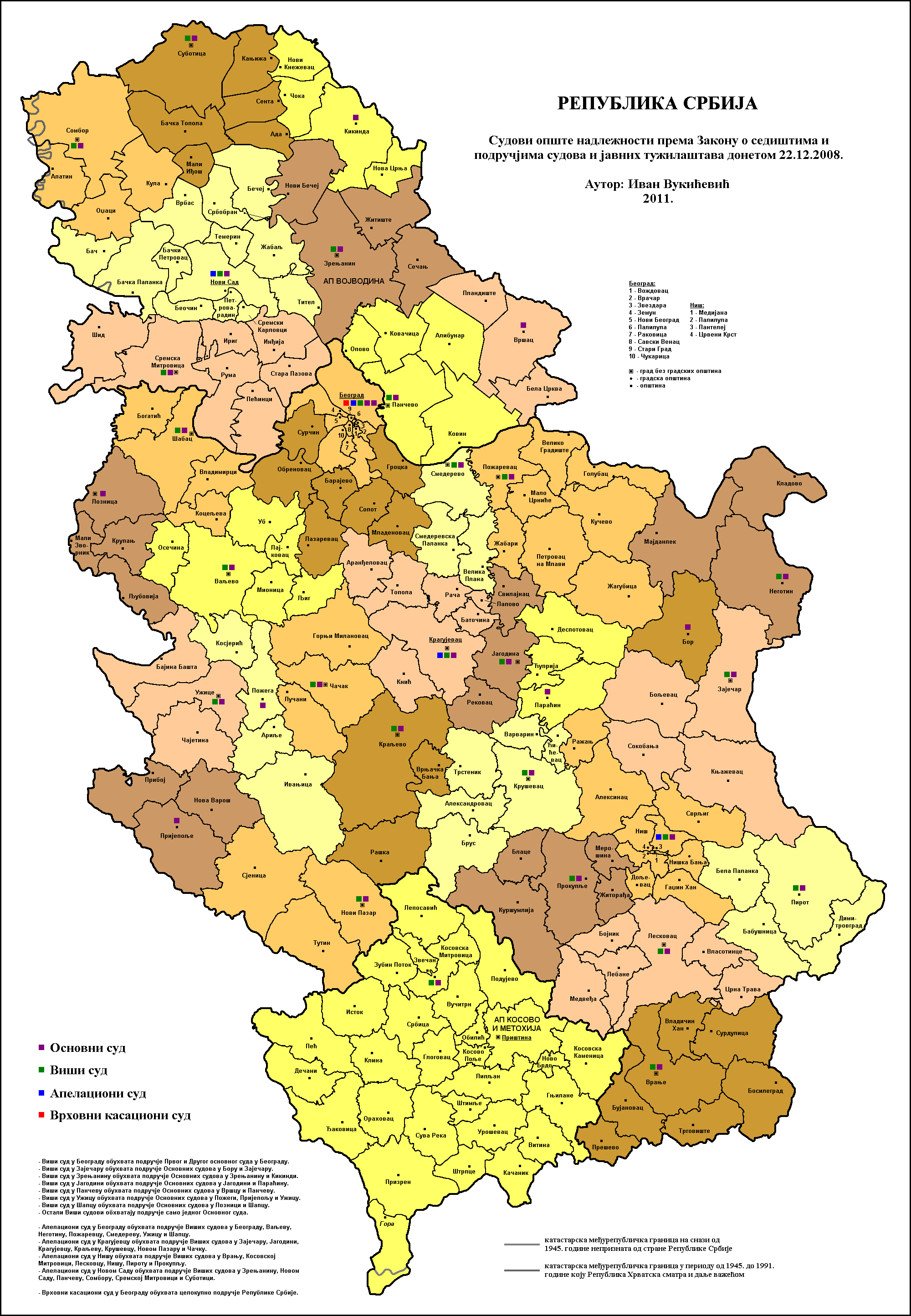 Судови опште надлежности у Србији 2008. године. Аутор: Иван Вукићевић